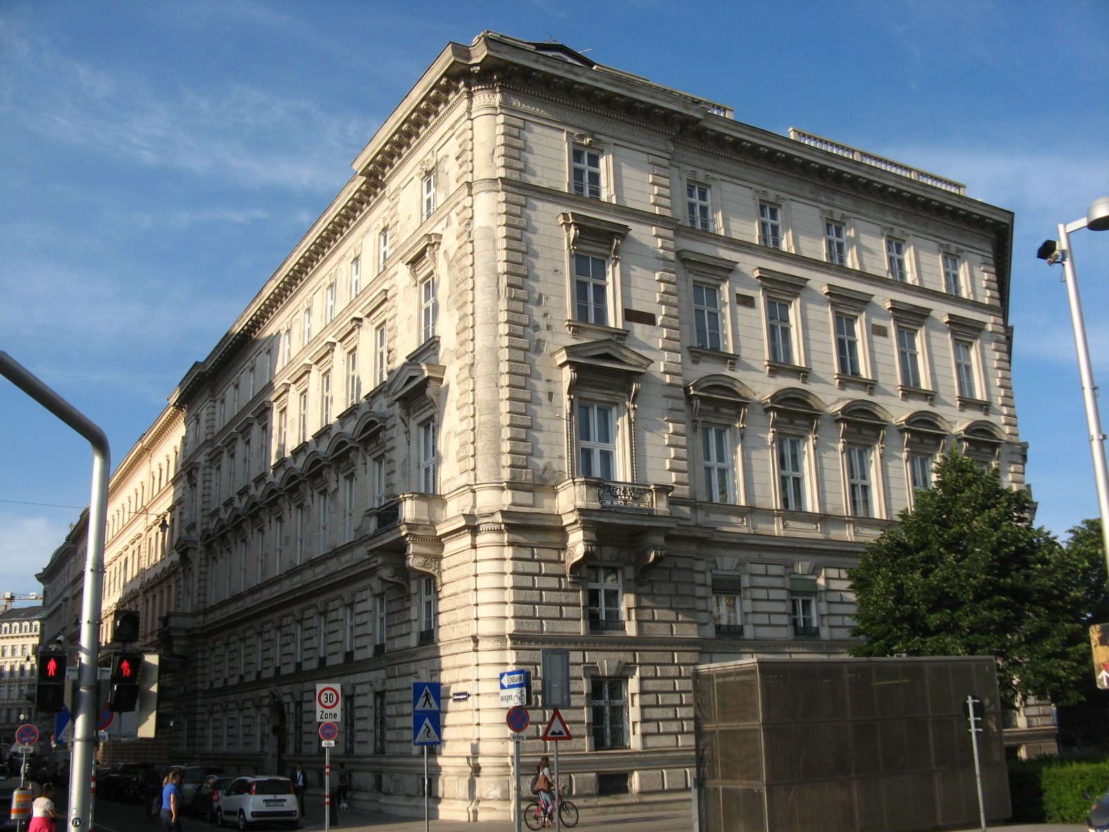 Canovagasse Nr. 7 (1869) von Romano und Schwendenwein, Wien 1